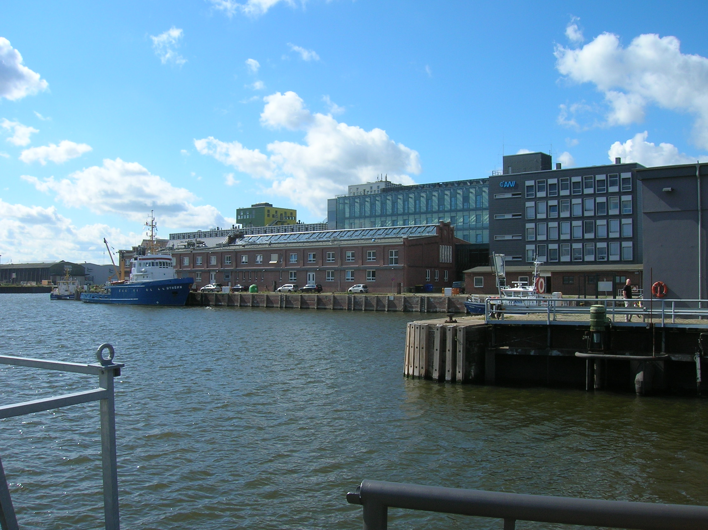 Westseite des Handelshafens in Geestemünde: Rückseite vom Erweiterungsbau (Steidle) des Alfred-Wegener-Instituts. An der Pier liegt die Uthörn. Im Untergeschoss des alten Backsteingebäudes waren Werkstätten des Hansestadt Bremischen Amts, im Obergeschoss das Institut für Meeresforschung mit einer exquisiten Ausstellung über Flora und Fauna der Meereswelt untergebracht. Die Exponate wurden in Kisten verpackt und eingelagert. Inzwischen sind einige dieser Ausstellungsstücke ausgepackt und im Fischereihafen ausgestellt worden. – Im Vordergrund rechts die frühere Schleuse zum Geestevorhafen; im Hintergrund links der Verbindungskanal zum Fischereihafen I.